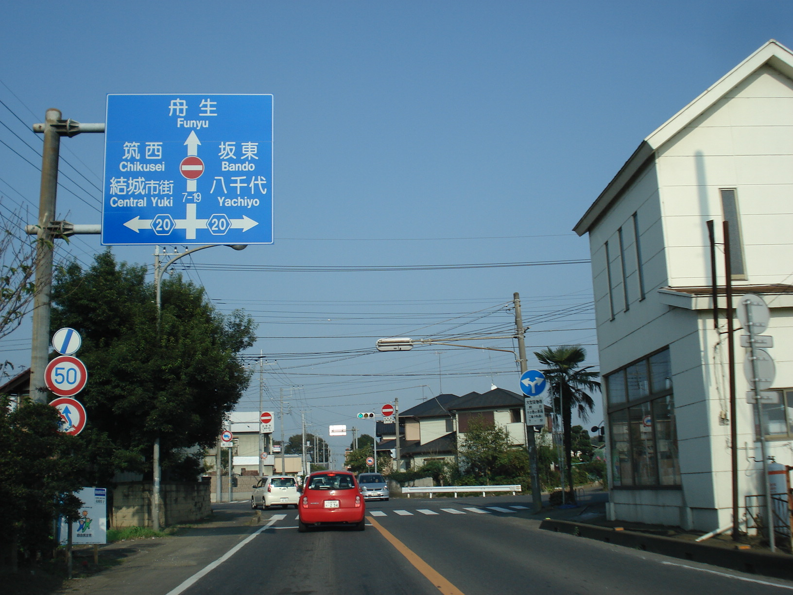 茨城県道23号筑西三和線 茨城県結城市山川新宿付近